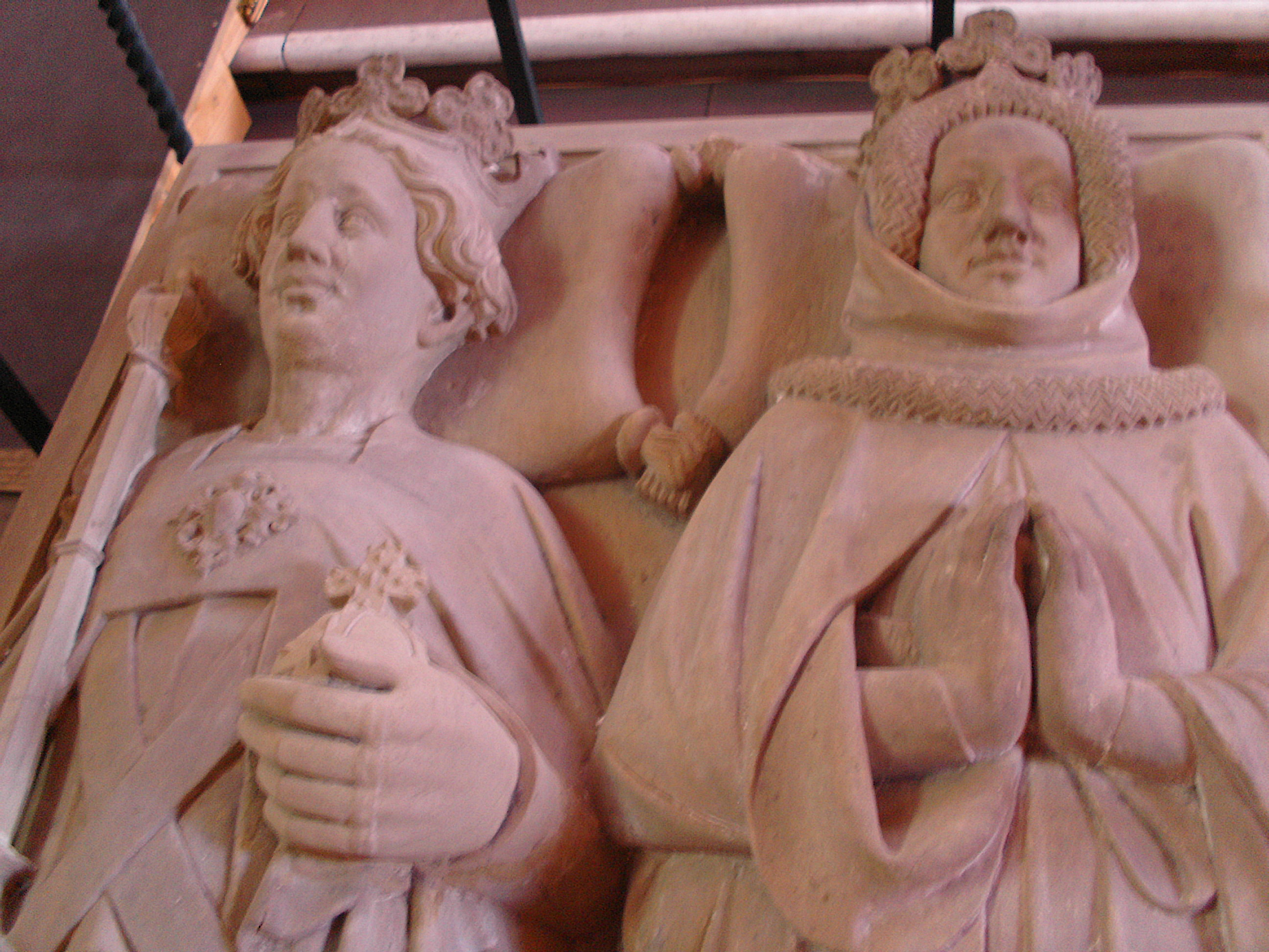 Kurfürst Ruprecht III. von der Pfalz (als Ruprecht I. deutscher König) und Ehegattin Elisabeth von Hohenzollern.